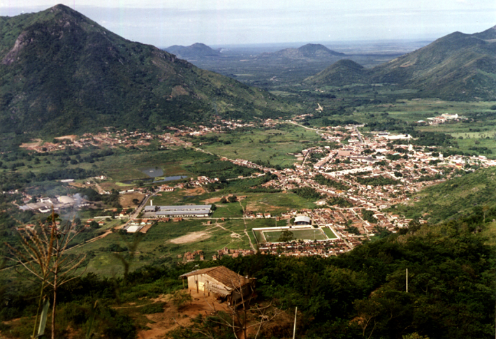 Vista aérea da Cidade de Uruburetama.